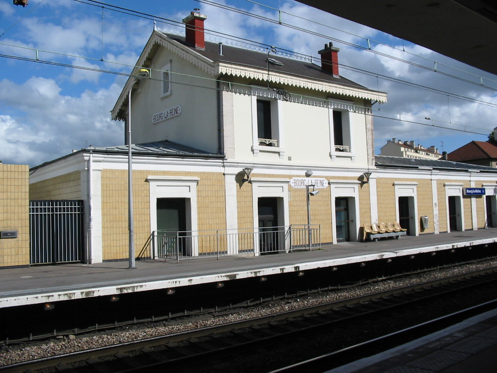 gare de Bourg-la-Reine, RER B, France